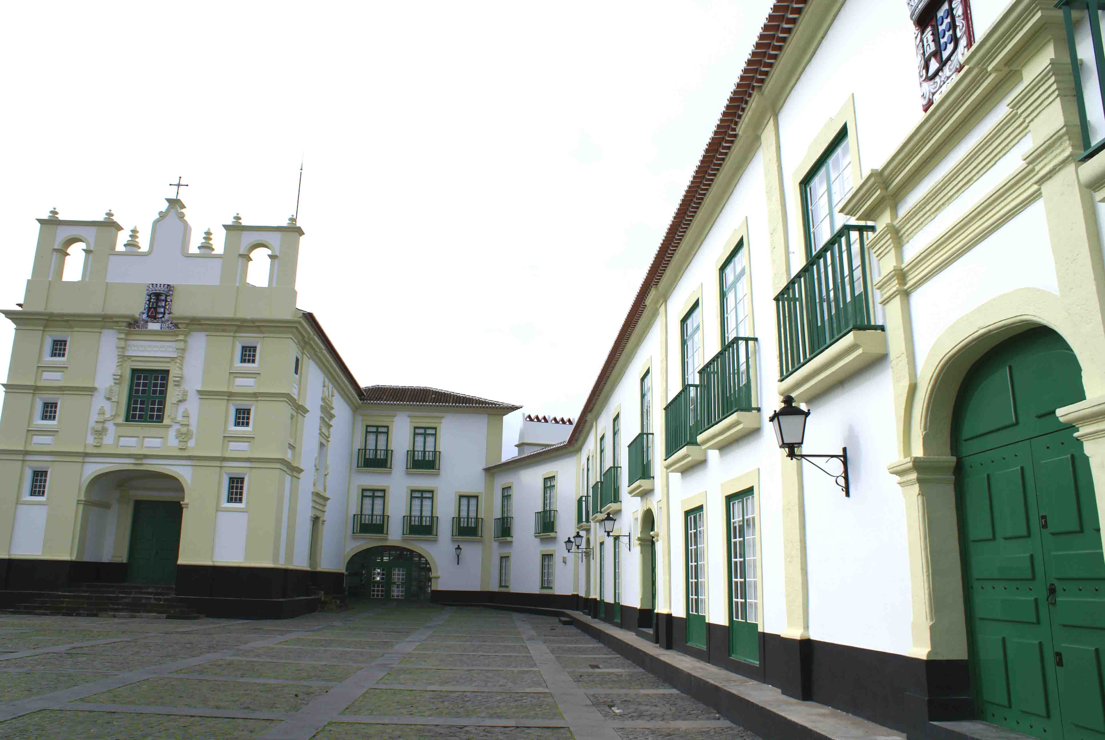 Vista geral do Solar dos Remédios ou Solar do Provedor das Armadas e a ermida anexa, Angra do Heroísmo, ilha Terceira, Açores, Portugal